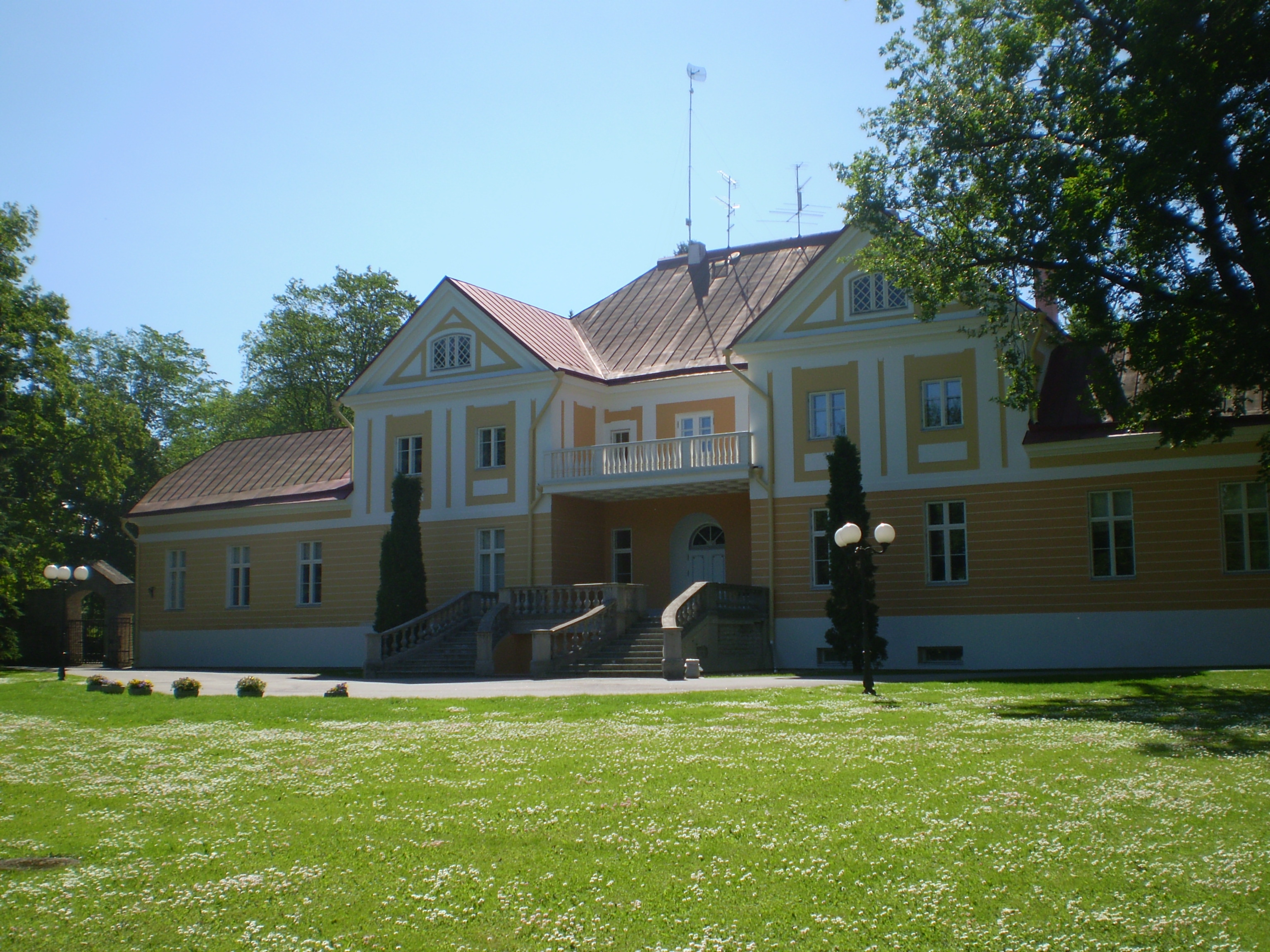 Maardu mõisa peahoone 18.–20. saj